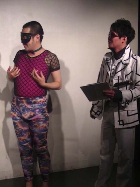 魔族 (お笑いコンビ) 2018年9月